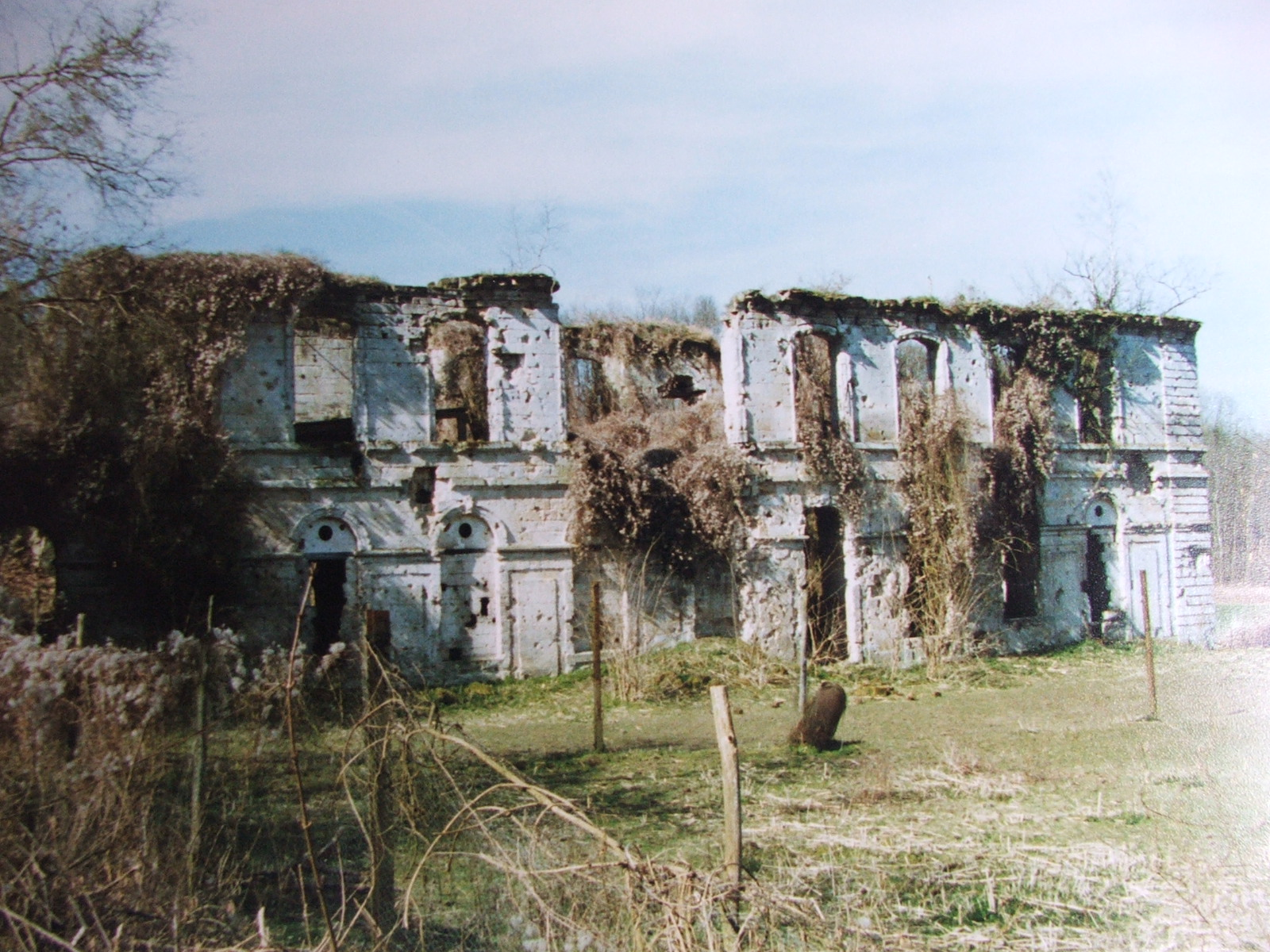 Vue de face des ruines avant les fouilles de Pierre et Françoise POTTIER